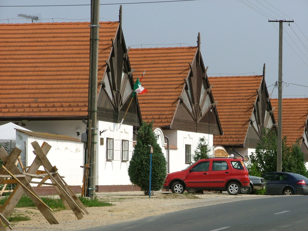 Altenheim in Oszko